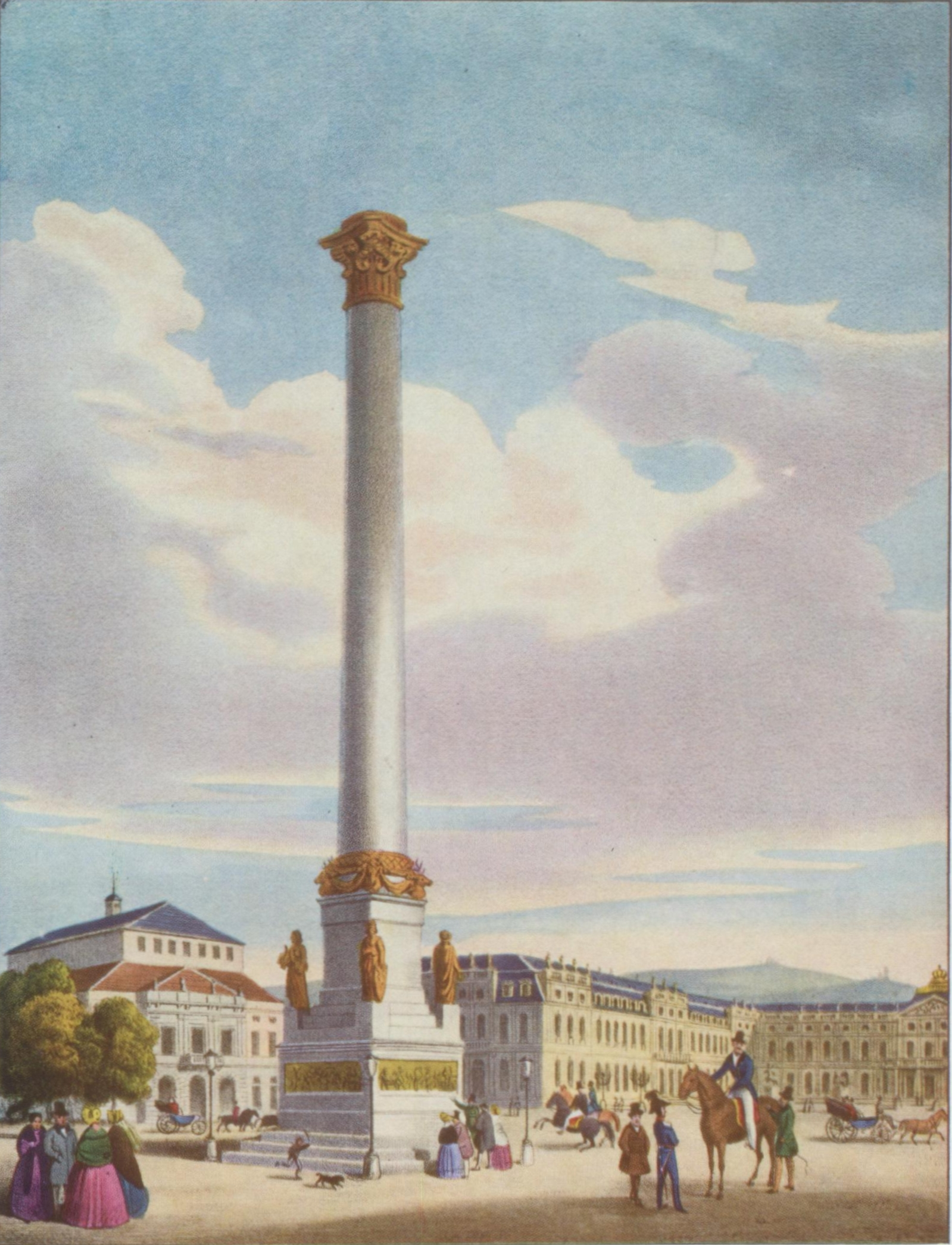 Jubiläumssäule auf dem Schlossplatz in Stuttgart, vor 1863, noch ohne die Concordia-Statue, die erst 1863 ergänzt wurde. Links: Hoftheater, das aus dem Neuen Lusthaus hervorging, rechts: Neues Schloss.